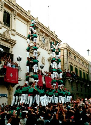 Únic 3 i 4 de 9 amb folre descarregats simultaniament de la història, Castellers de Vilafranca